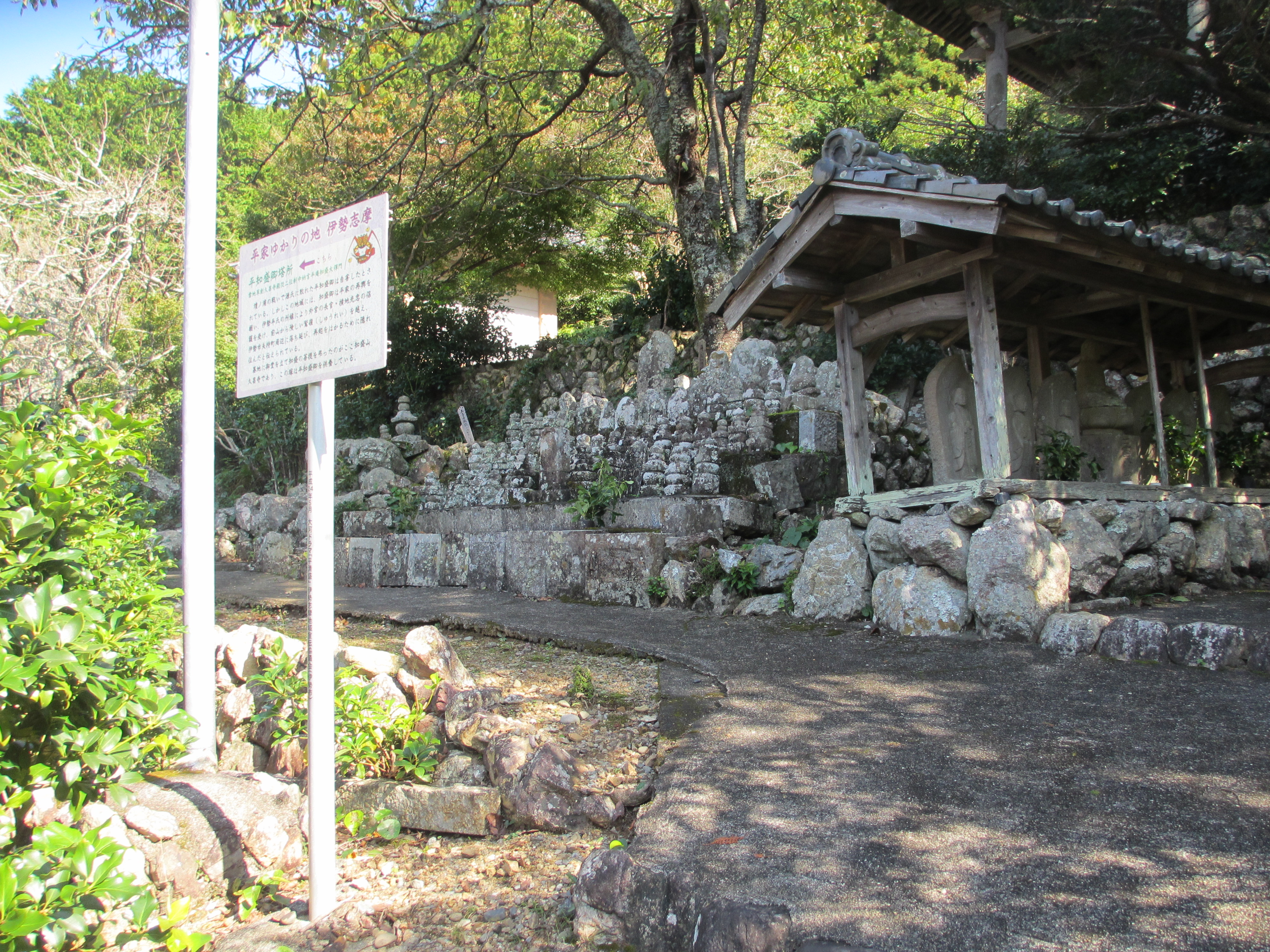 最寄JR伊勢市駅、近鉄宇治山田駅